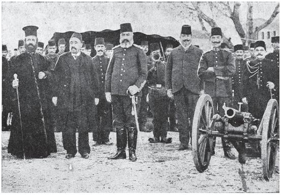 Германос Каравангелис с османска войска по време на потушаването на Илинденско-Преображенското въстание.